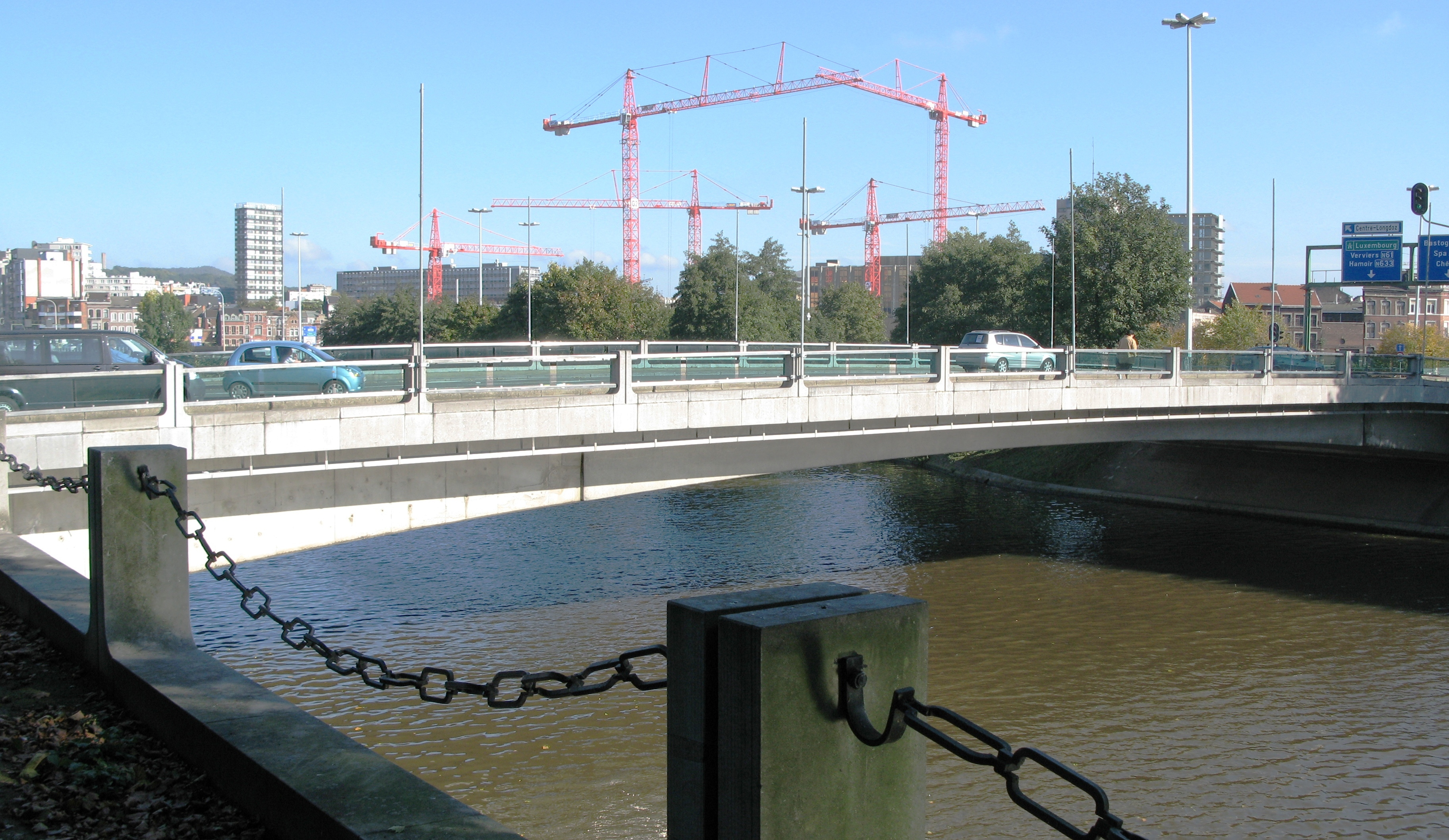 Pont des Vennes vum lénksen Uwänner gesinn.